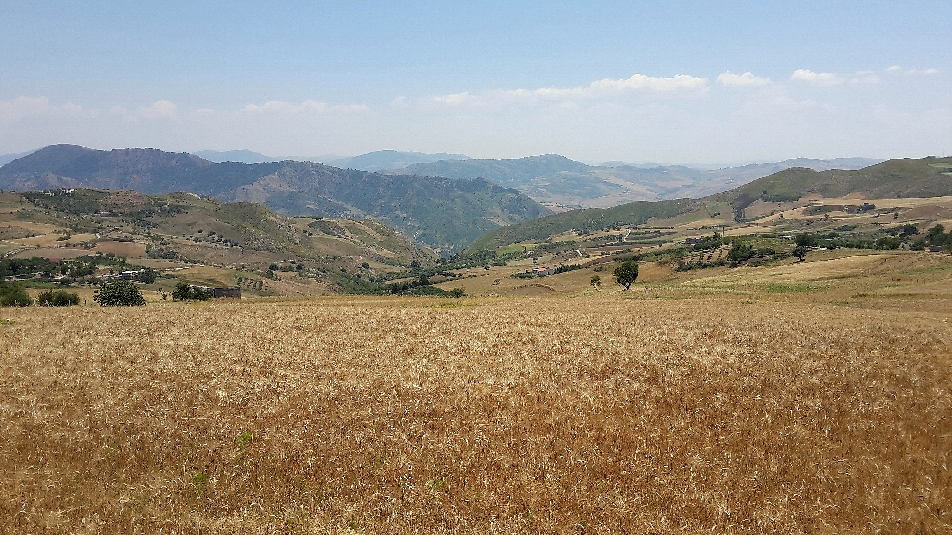 Ciminna (PA), ITA